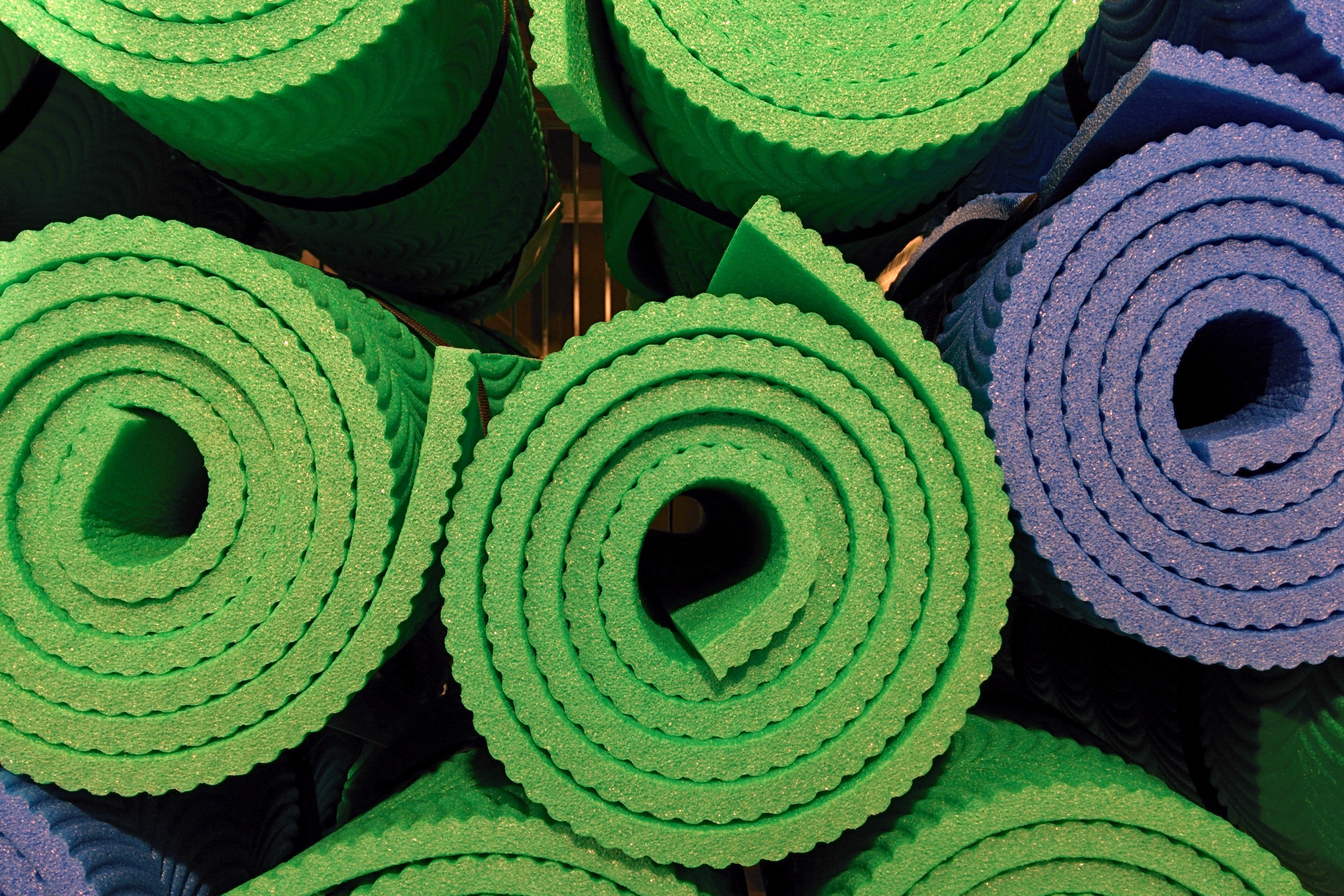 Einfache Schaumstoff-Isomatten, aufgerollt im Supermarkt